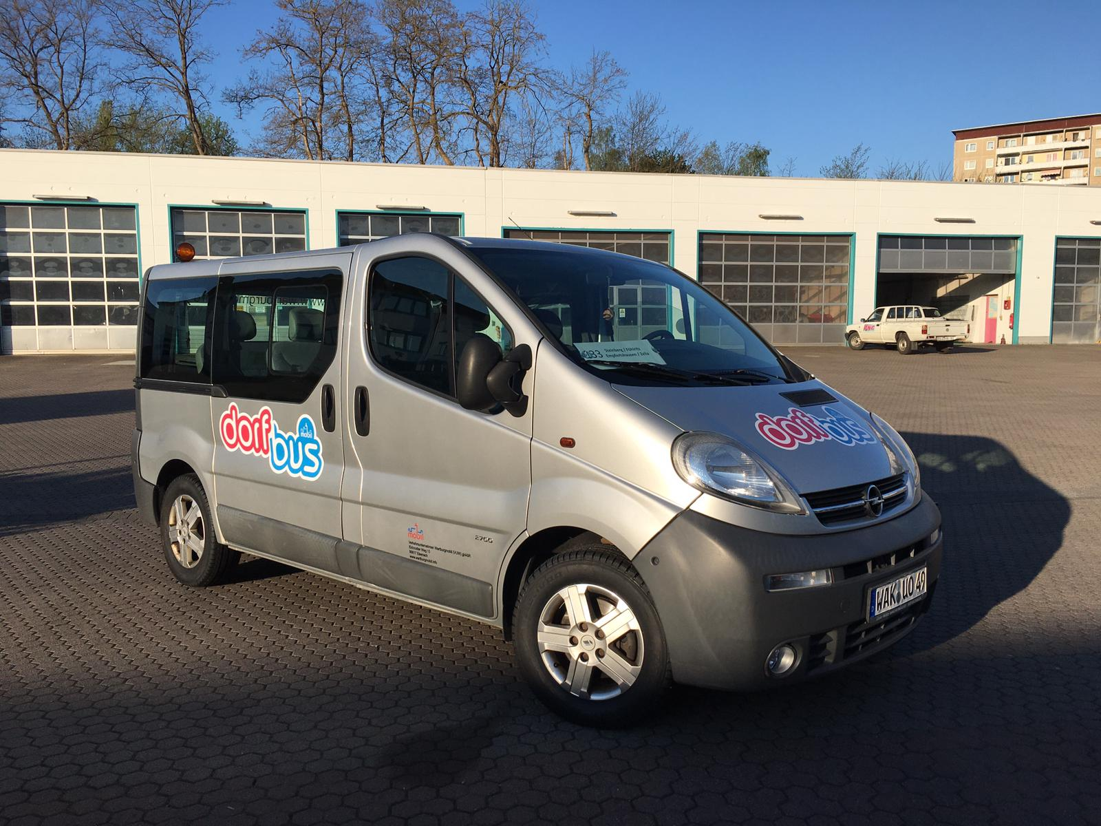 Erstes Dorfbusfahrzeug bei Wartburgmobil